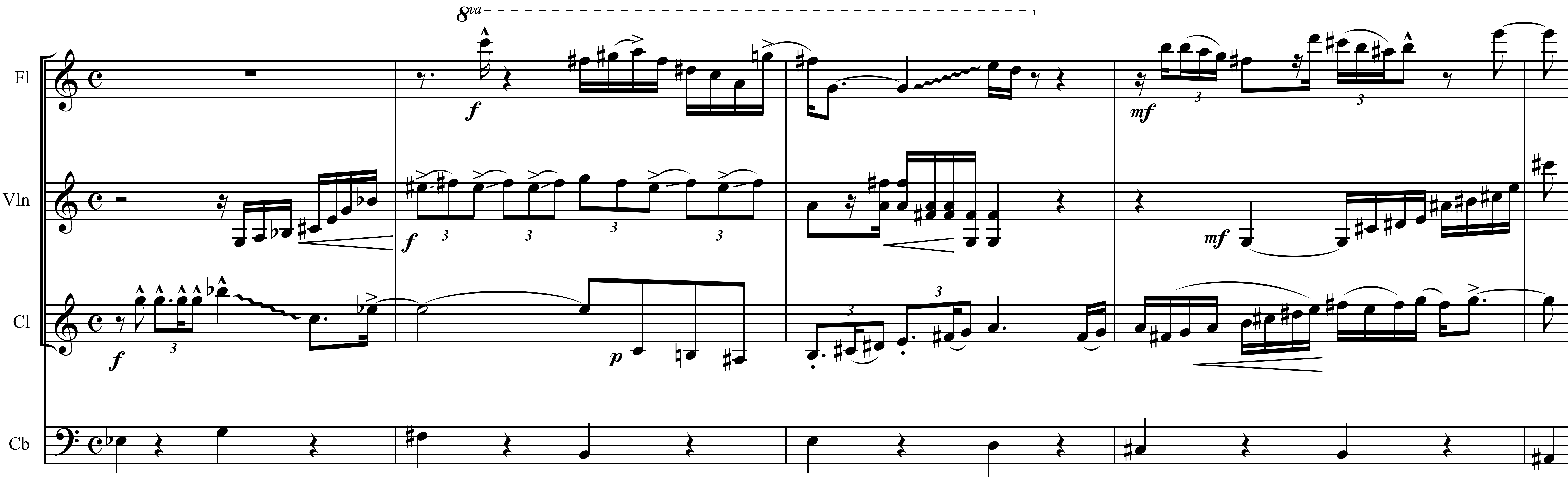 Extrait de la pièce XVIII d'Anna Livia Plurabelle d'André Hodeir